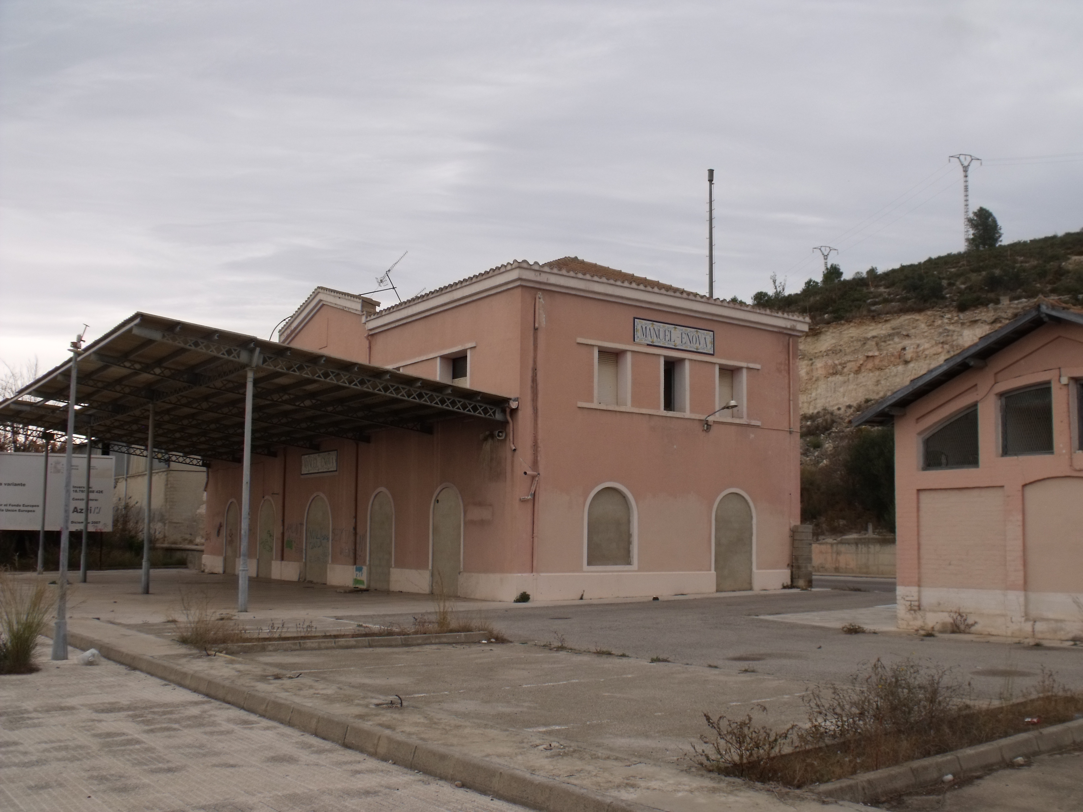 Vista de un lateral de la estación de Manuel